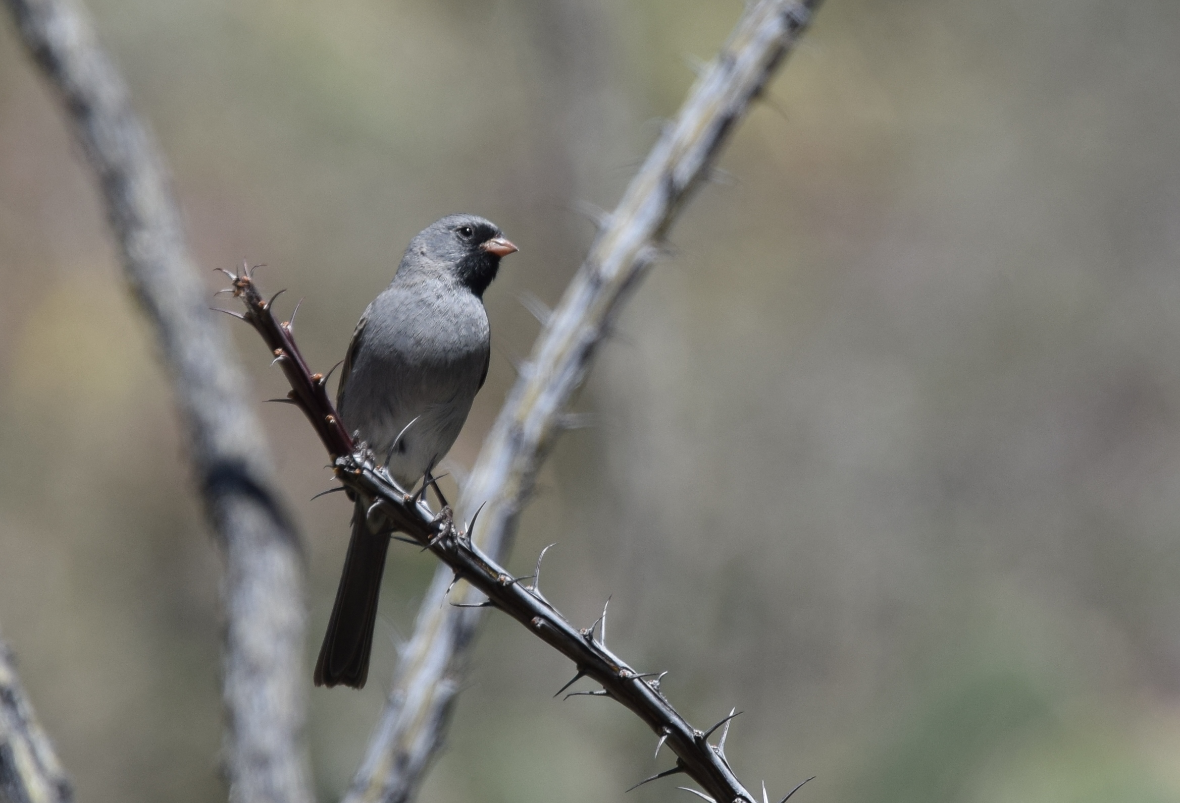 AZ 2017